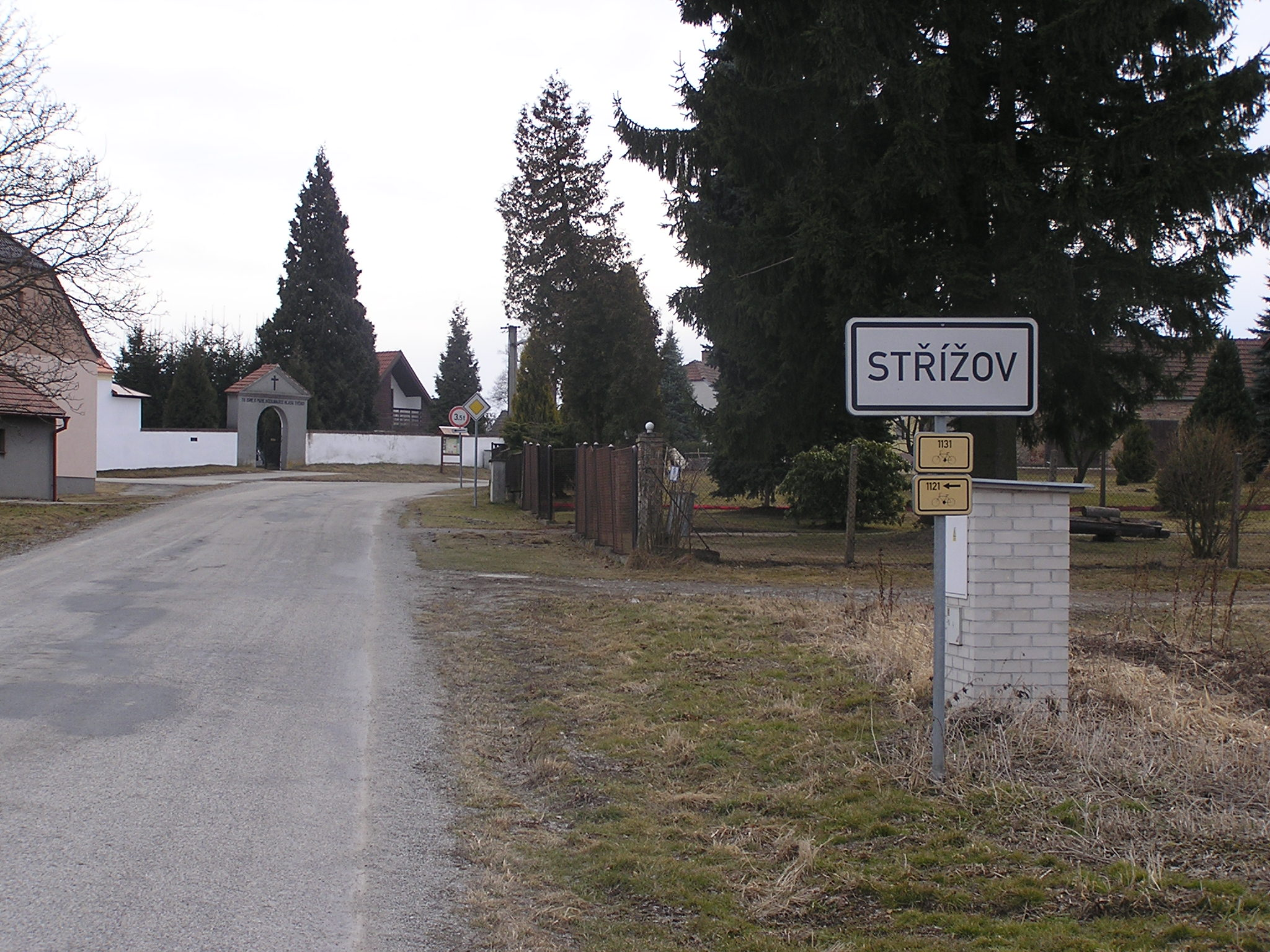 Příjezd do vesnice od Borovnice, vlevo hřbitov